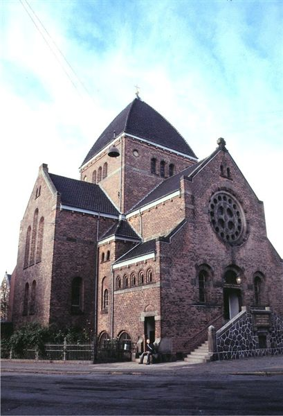 Brorsons Kirke i Danmark. Brorsons kirke